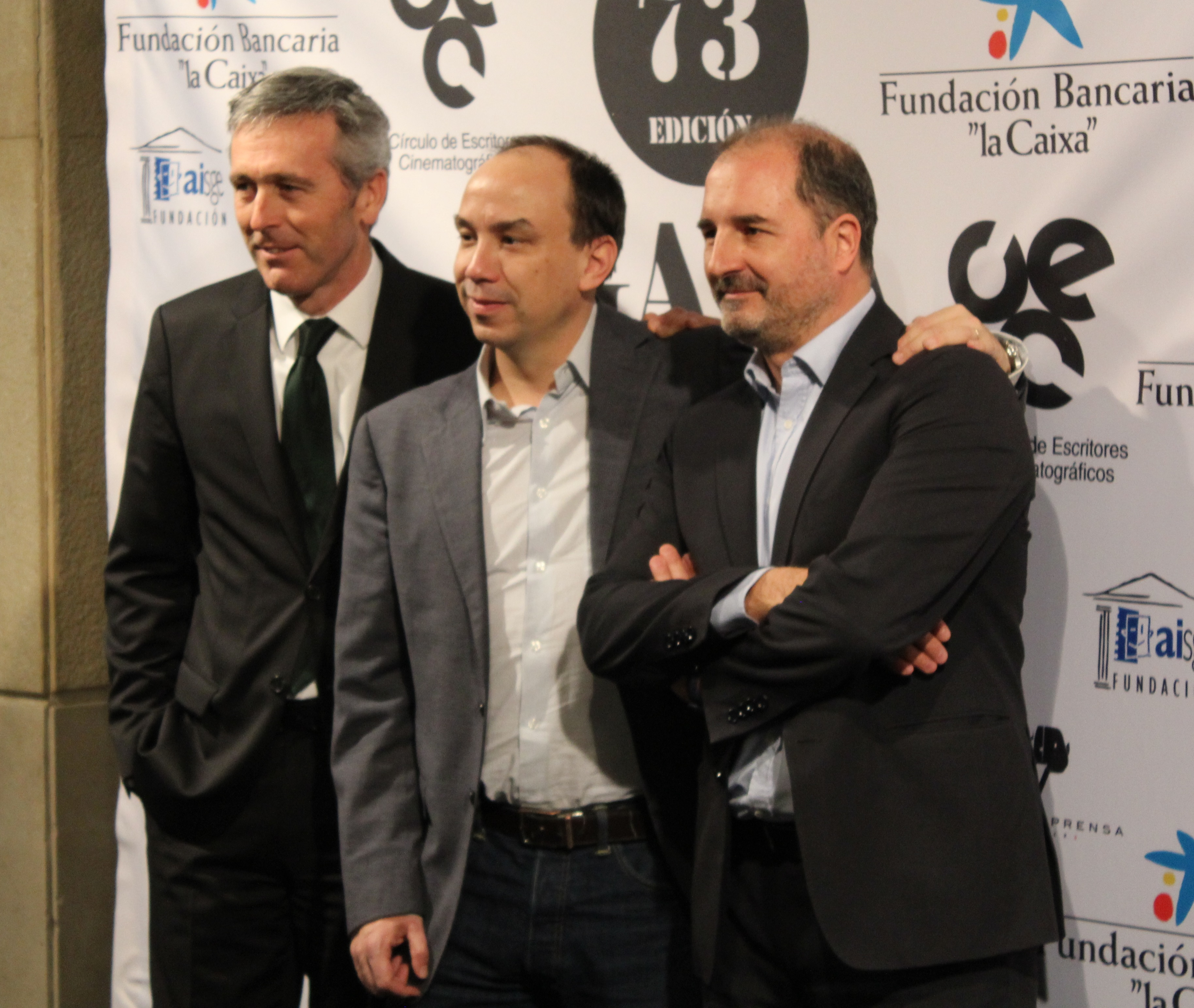 Nico Matji, Ghislain Barrois y Álvaro Agustín, productores de la película española de animación Tadeo Jones 2: El secreto del rey Midas, en la 73 edición de las Medallas del Círculo de Escritores Cinematográficos.